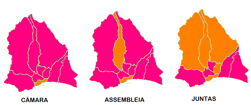 Mapa ilustrativo do partido mais votado por freguesia no Funchal (2017)